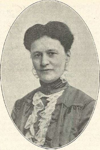 Gertrud Rodhe (1872-1948)